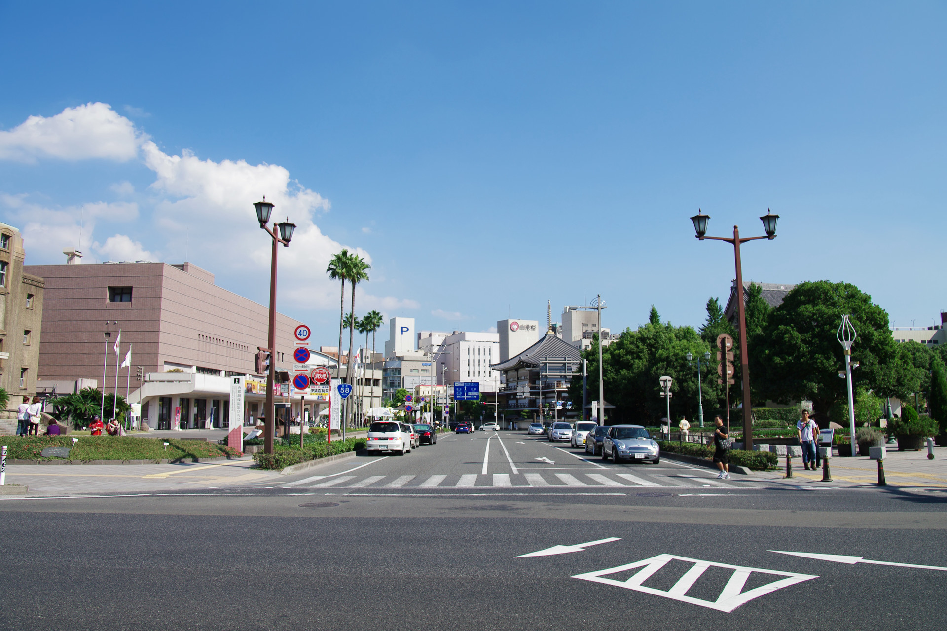 中央公民館前交差点（鹿児島市）